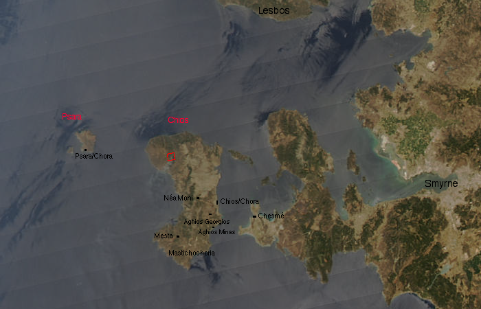 Map of / Carte de Chios and Psara (Greece/Grèce) pour Massacre de Chios et Massacre de Psara